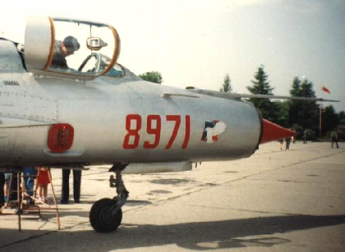 Sposób rozmieszczenia godła 34. pułku lotnictwa myśliwskiego na kadłubie samolotu MiG-21 bis. Fot. z 1993 r.